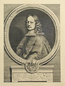 Franz Egon von Fürstenberg, Bischof von Straßburg, Domherr in Speyer